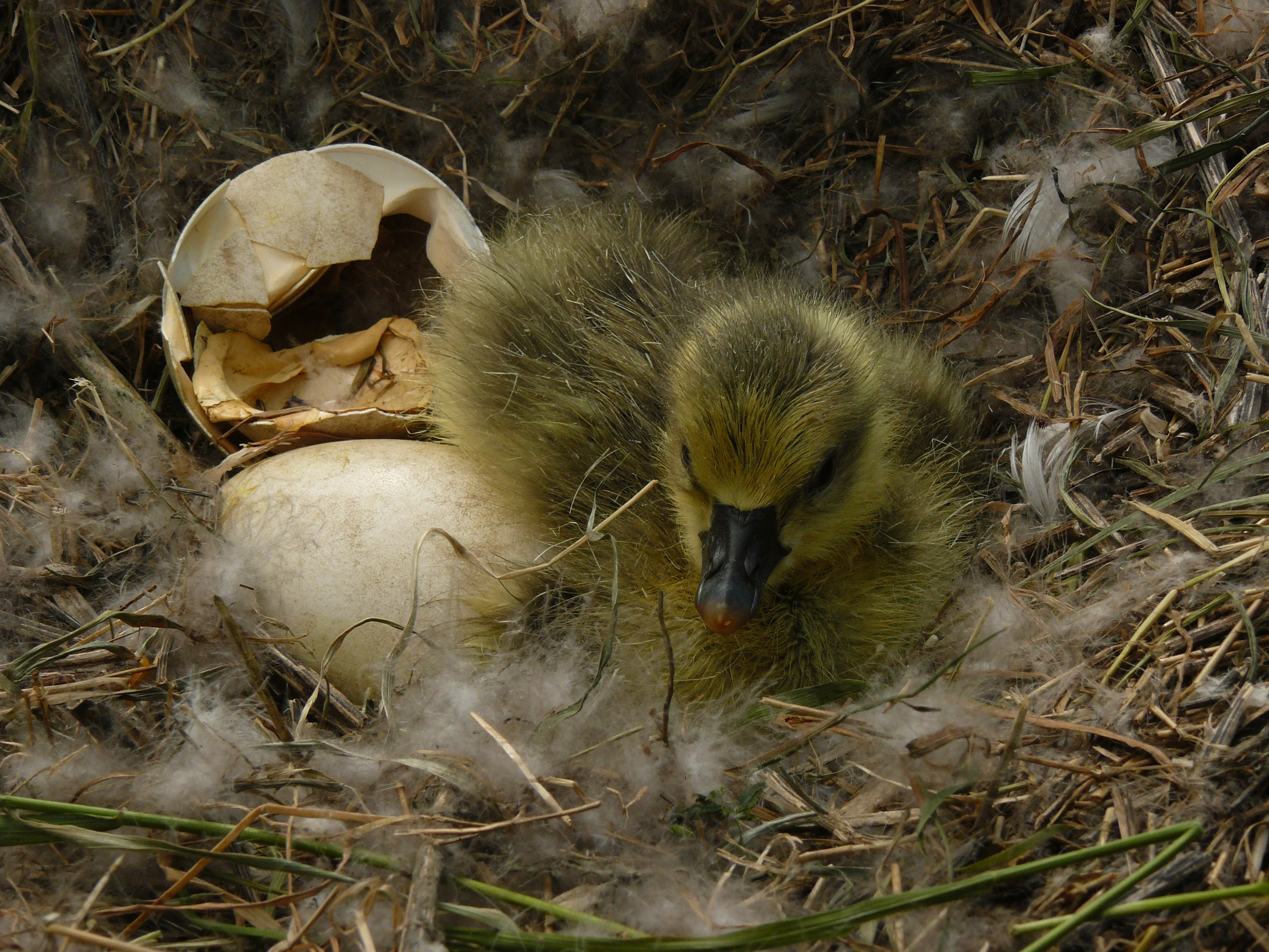 Gelege der Graugans (Anser anser) mit Gössel, etwa 60 Minuten nach dem Schlüpfen.